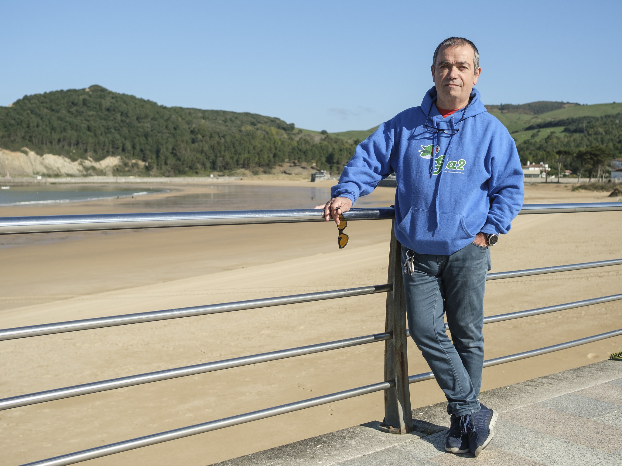 Gabi de la Maza karaoke-ekoizlea Gorlizko hondartzan.